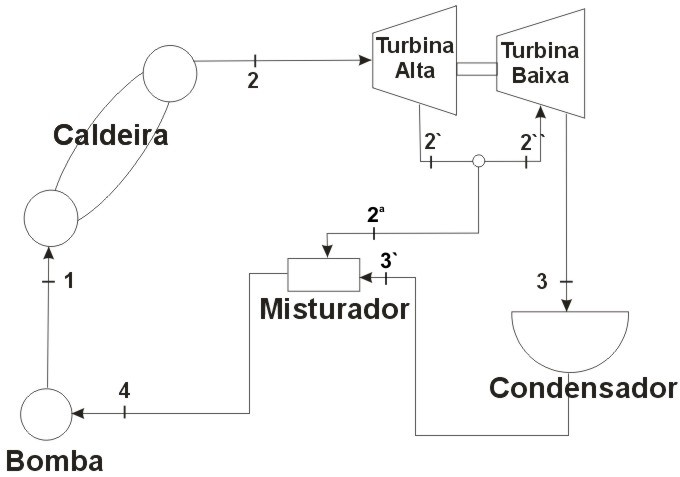 Esboço do ciclo rankine regenerativo